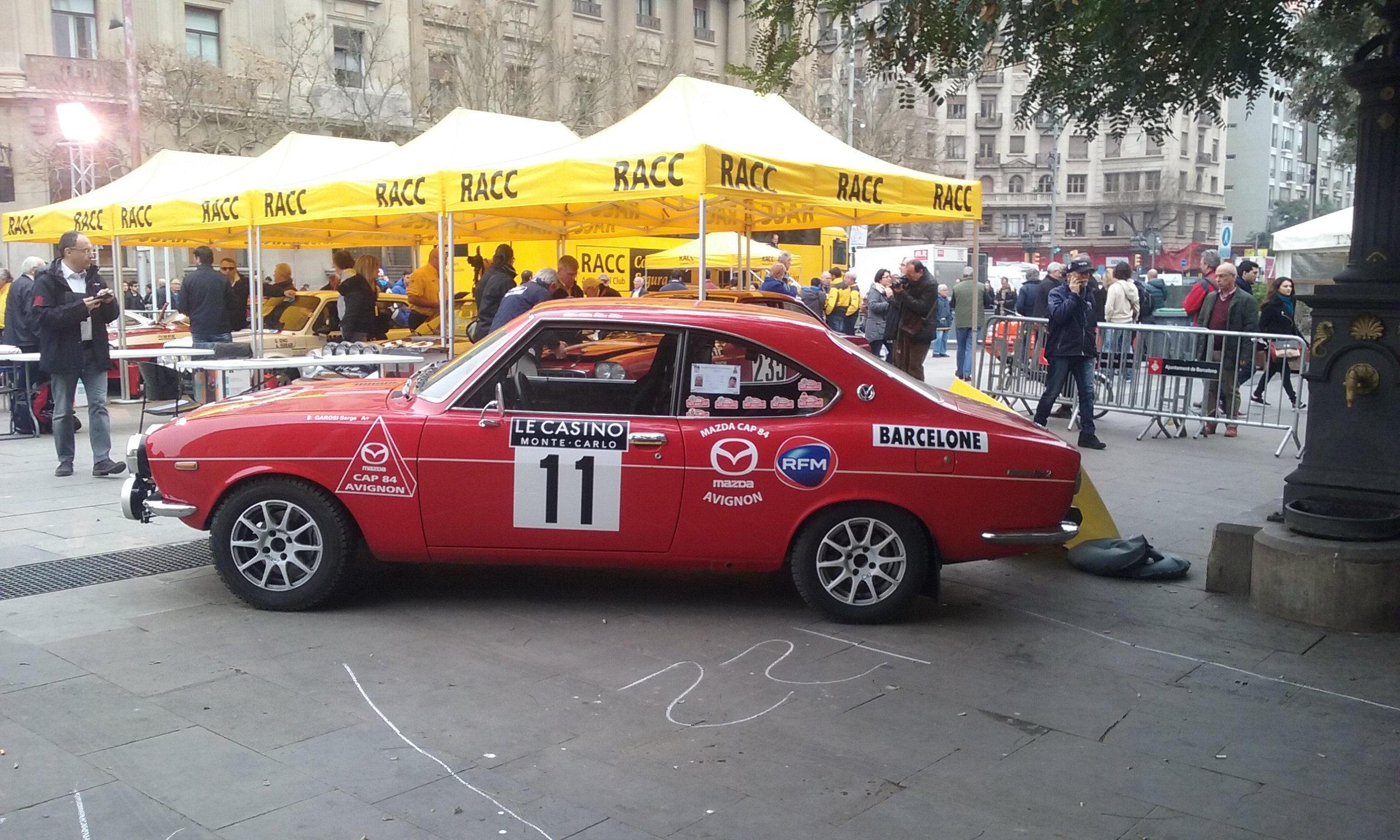 Mazda RX-2 a la Sortida del Rallye Monte-Carlo Historique 2016 des de Barcelona